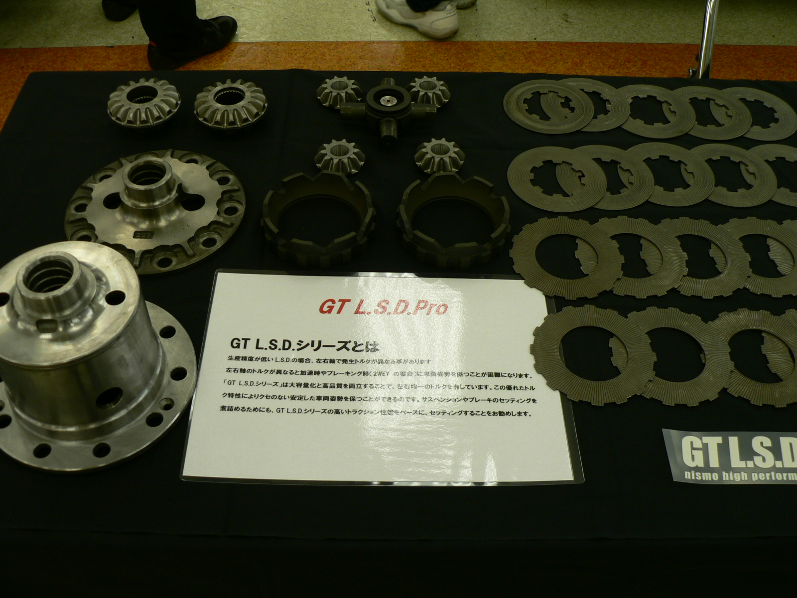 NISMO GT L.S.D. Proの構成部品。 TUNING POWERS! 2007で撮影。